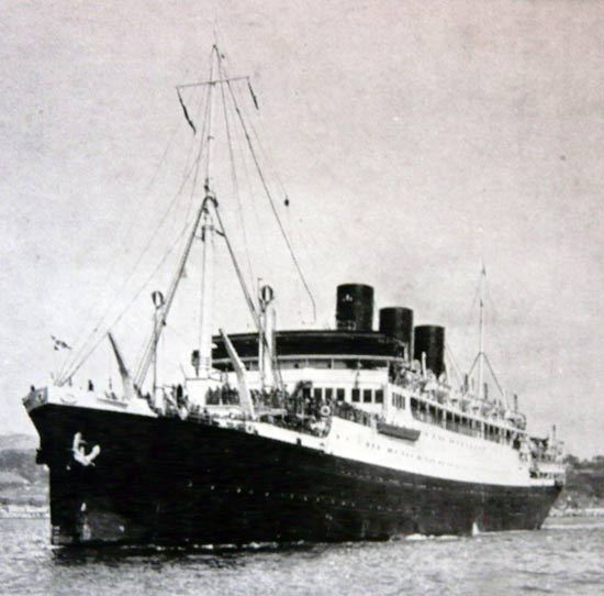 Champollion avant transformation